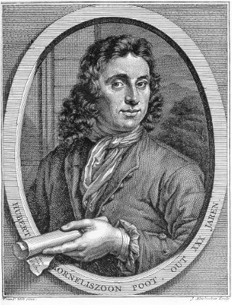 Dichter Hubert Kornelizoon Poot